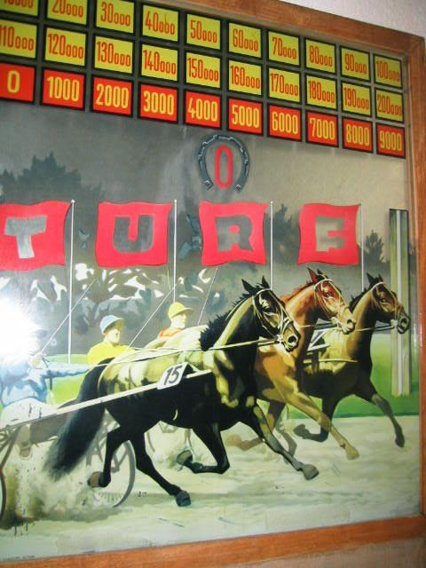 Ergmann-Turf